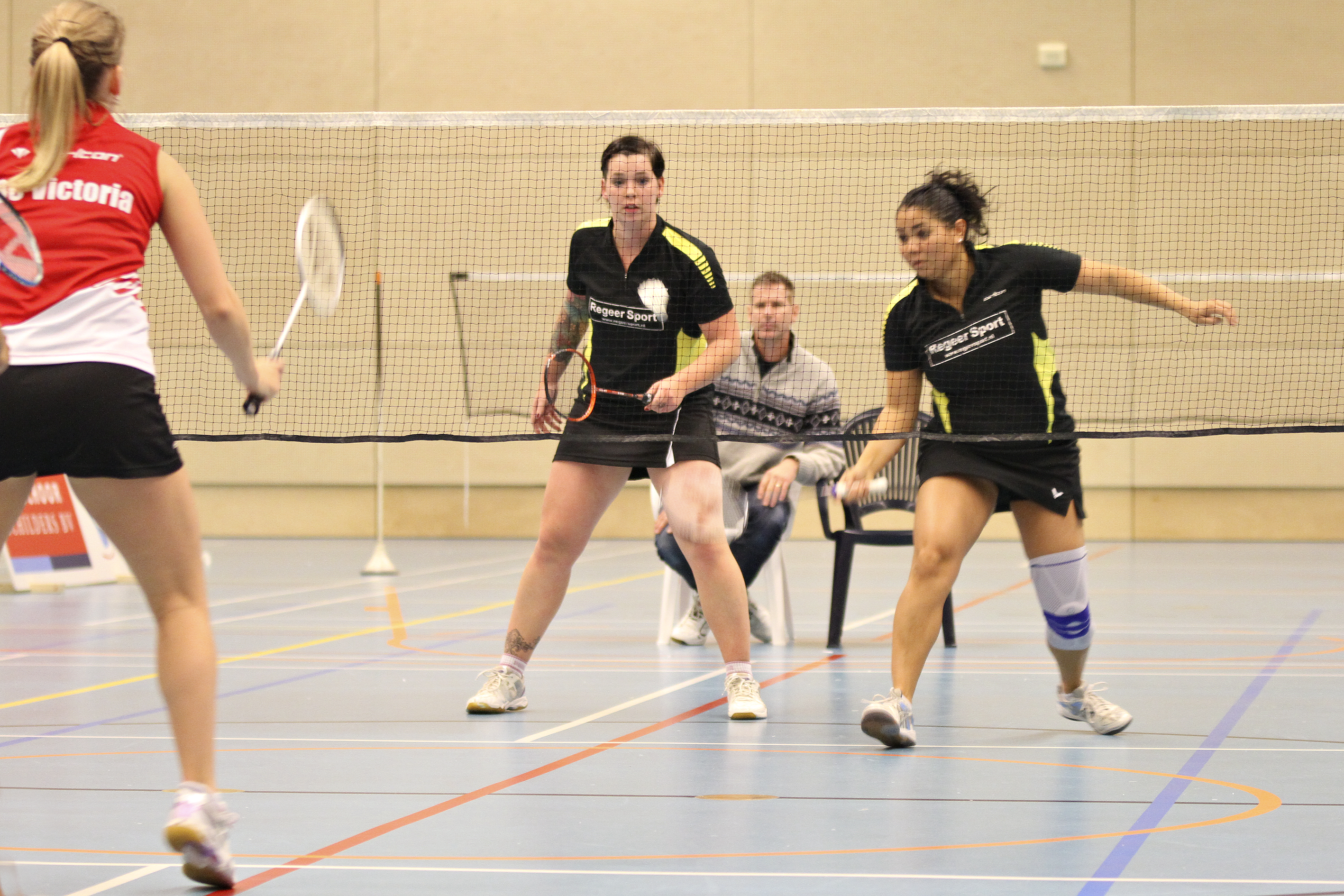 Badminton Eredivisie